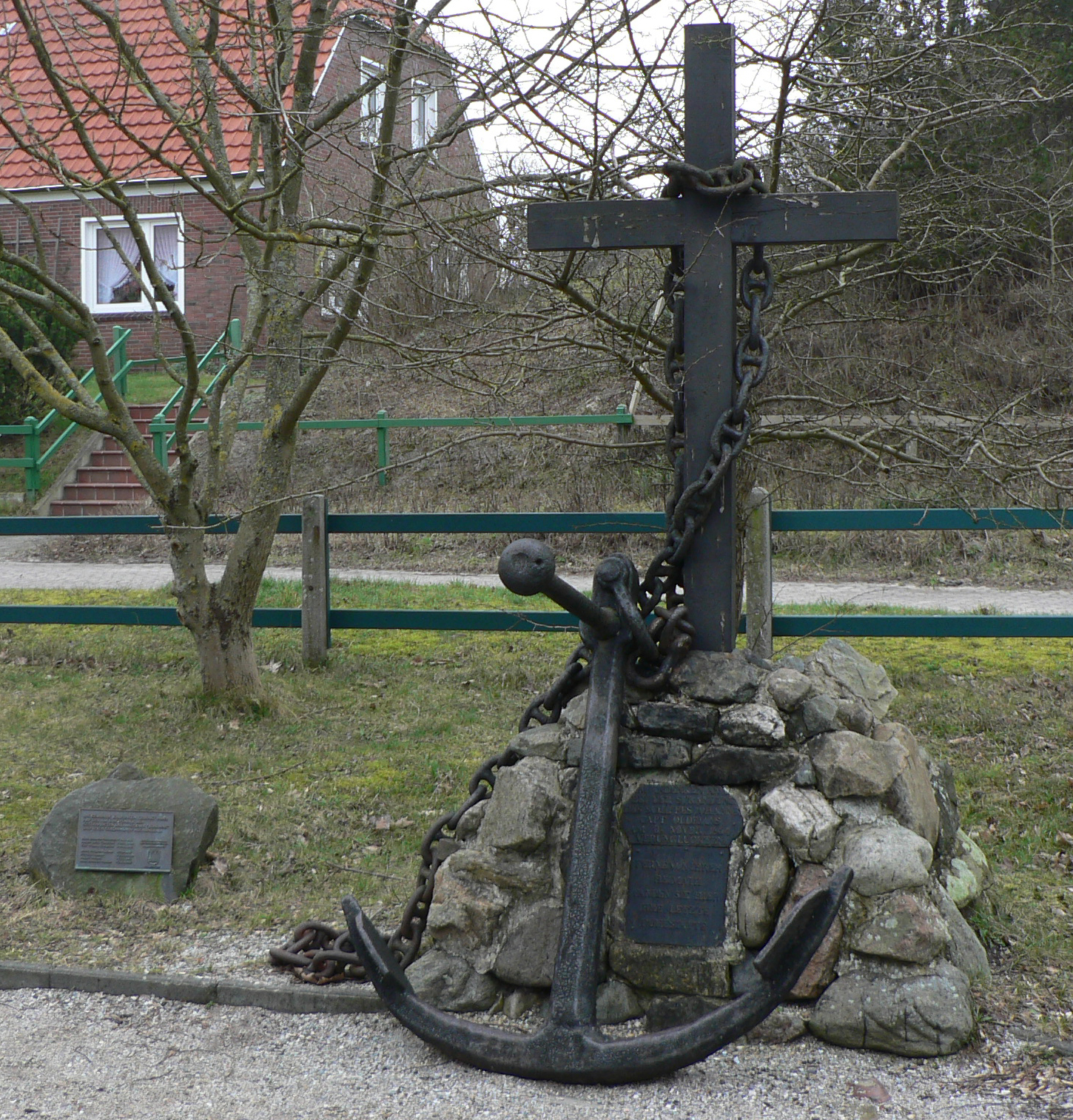 Drinkeldodenkarkhof:Gedenkstätte